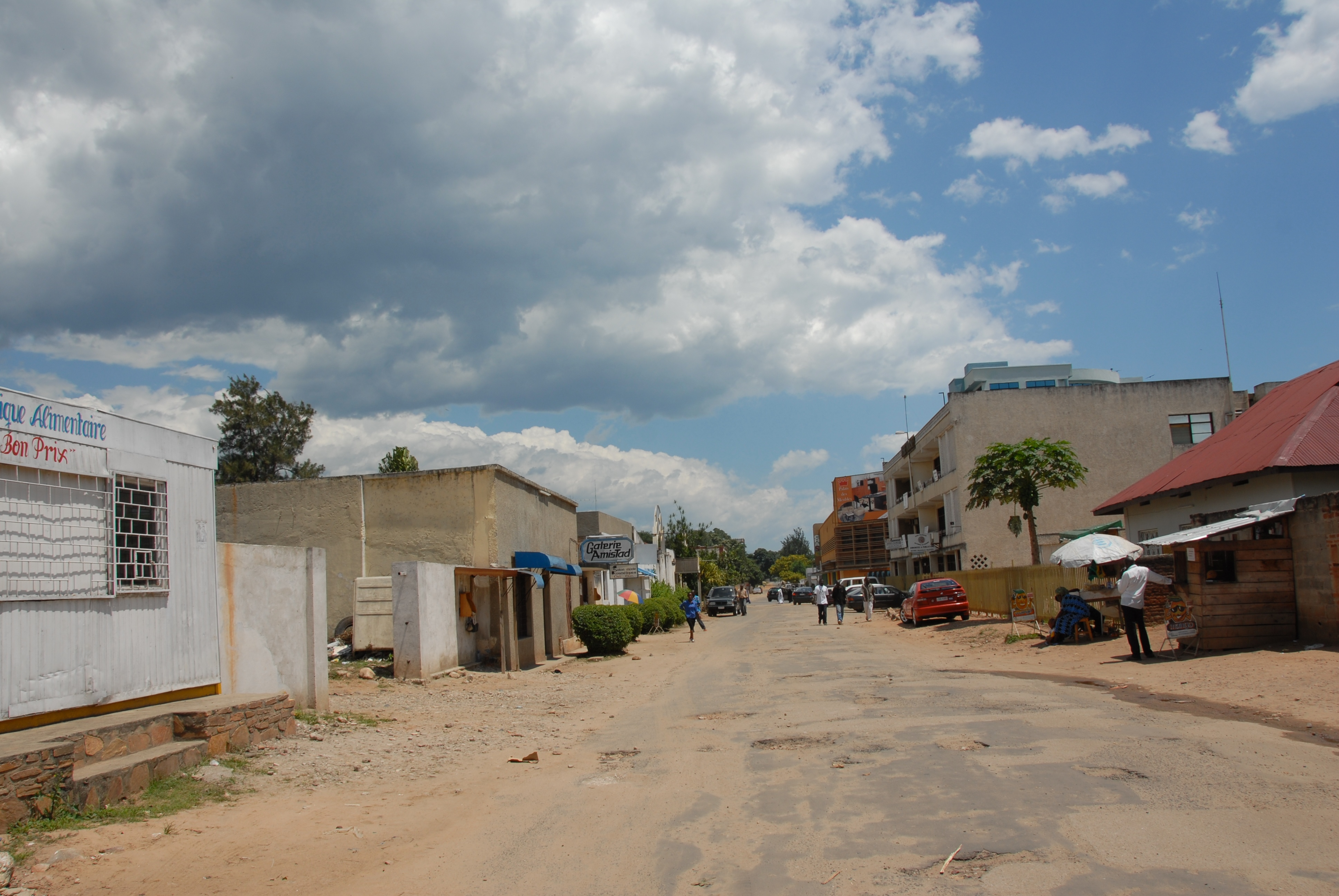 Bujumbura